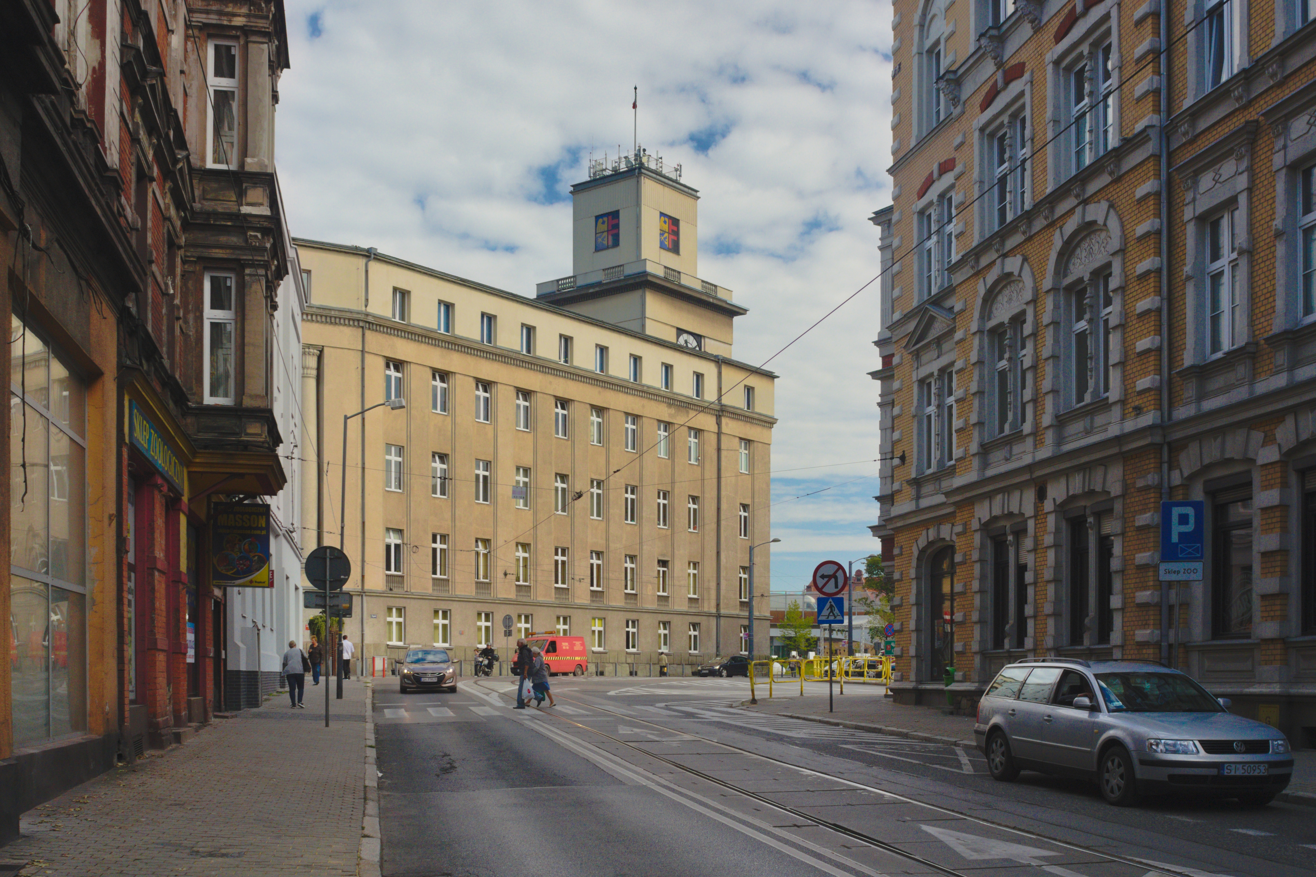 ratusz w Chorzowie, elewacja południowa, widok z ul. Powstańców